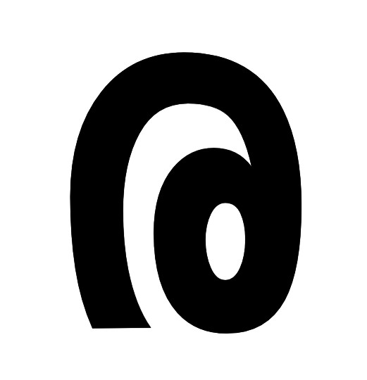 ര മലയാളം അക്ഷരം